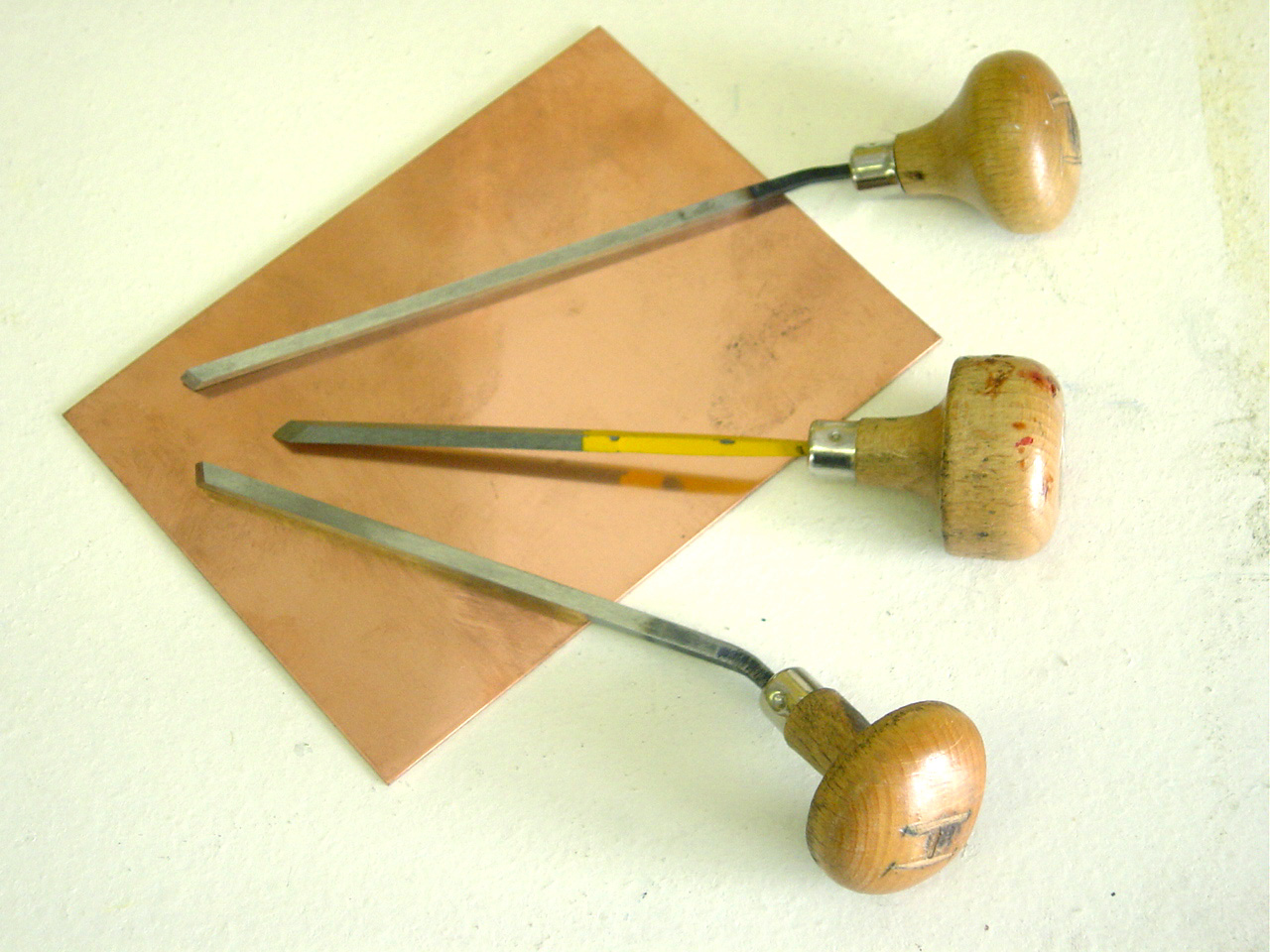 Intaglio printmaking - Engraving tools